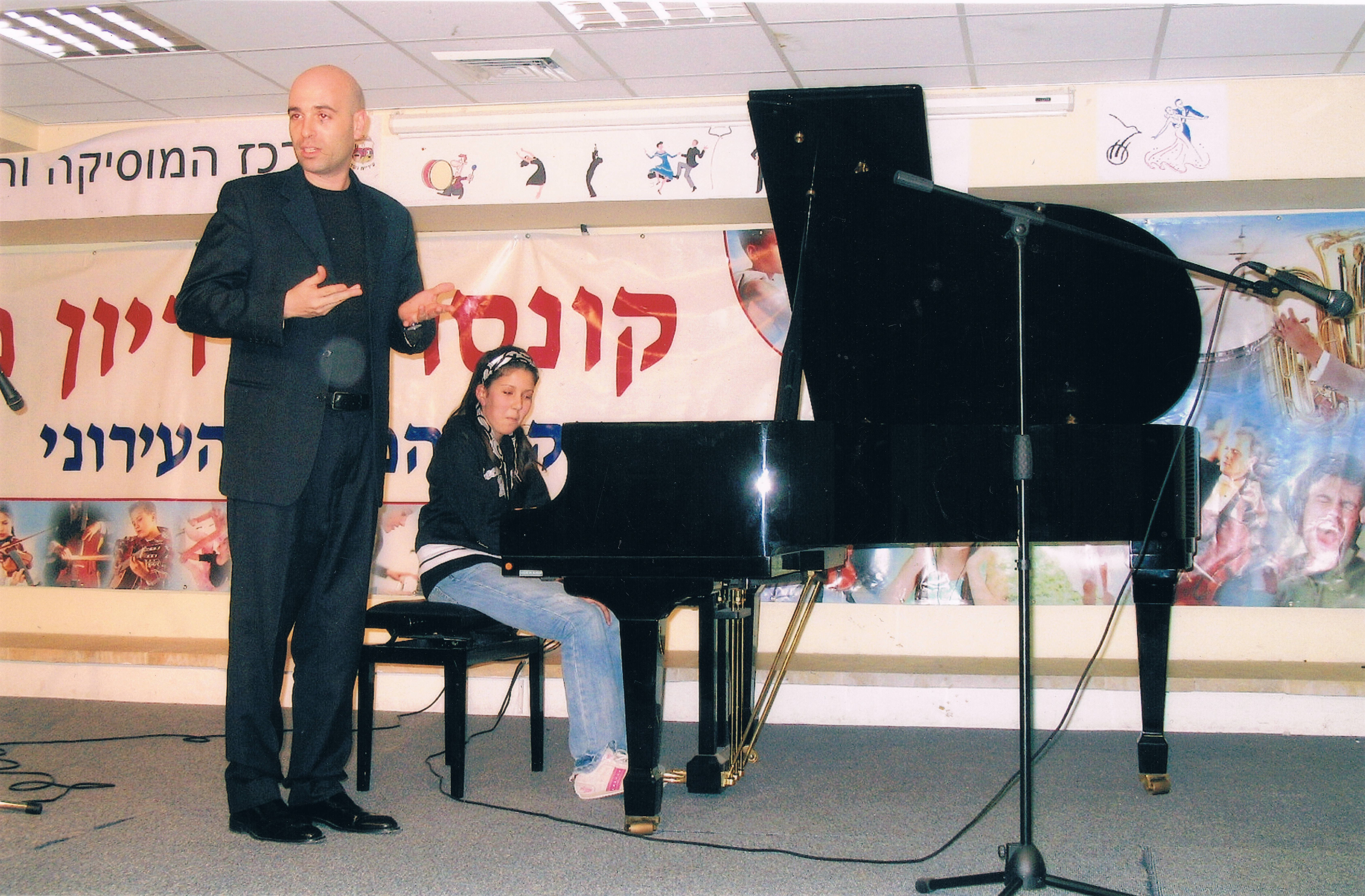 גיל שוחט בטקס פתיחת הקונסרבטוריון המחודש בעיר נשר